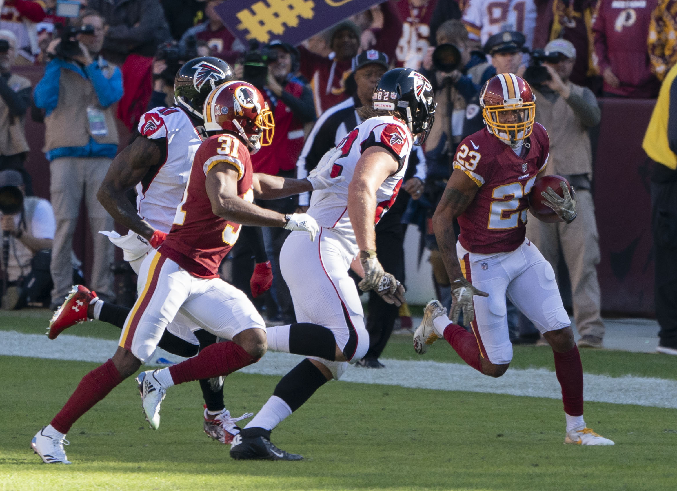 Falcons at Redskins 11/04/18